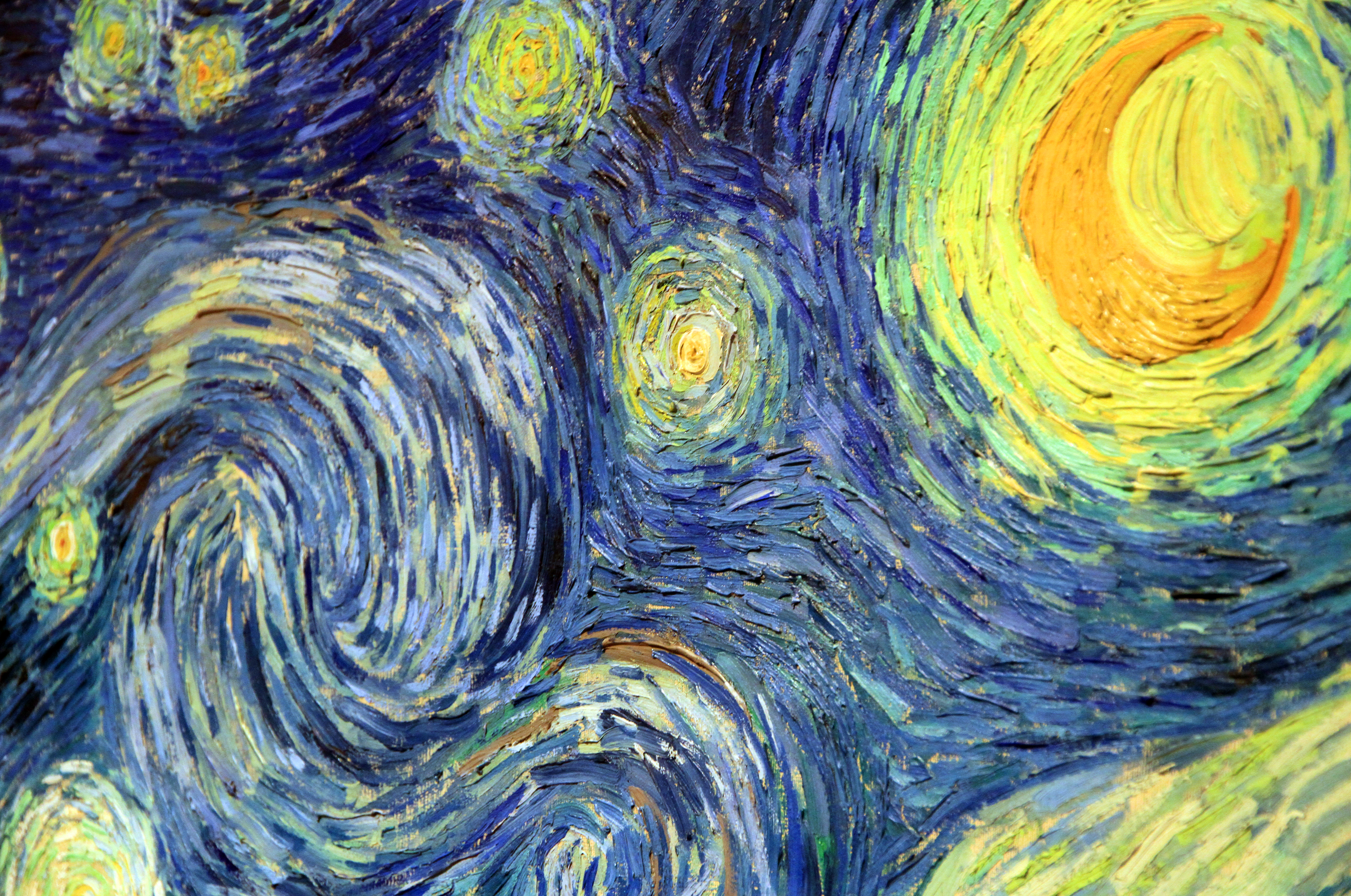 La noche estrellada (obra maxima)